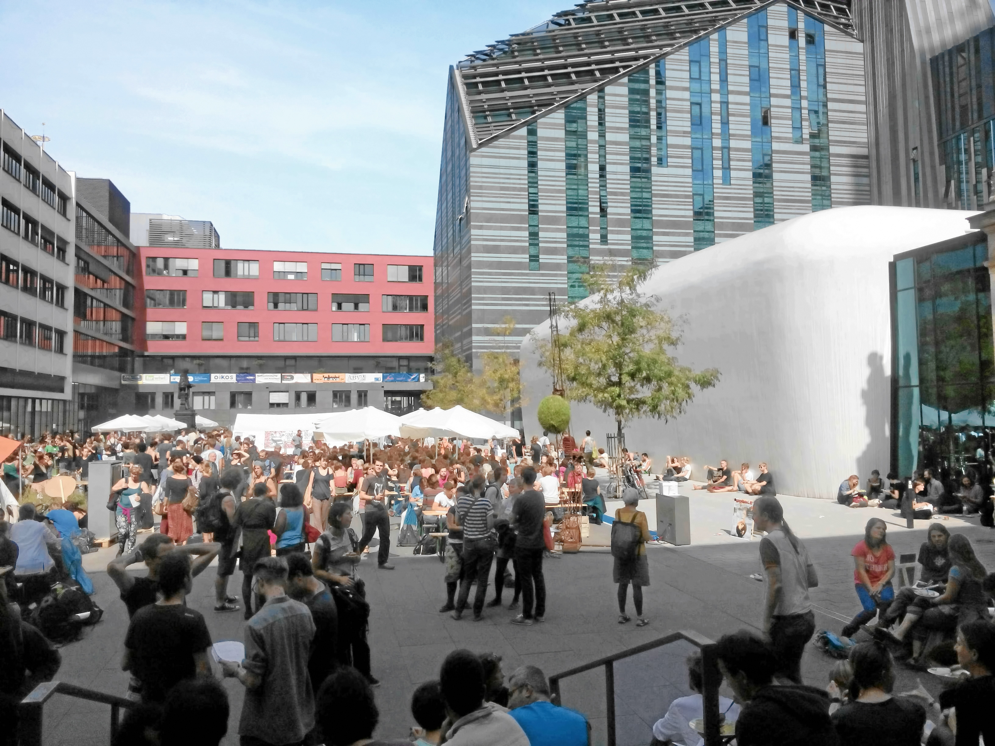 Degrowth 2014, Leipzig